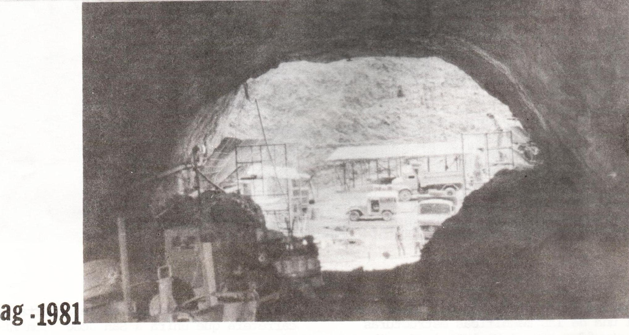 foto tunel zurqui